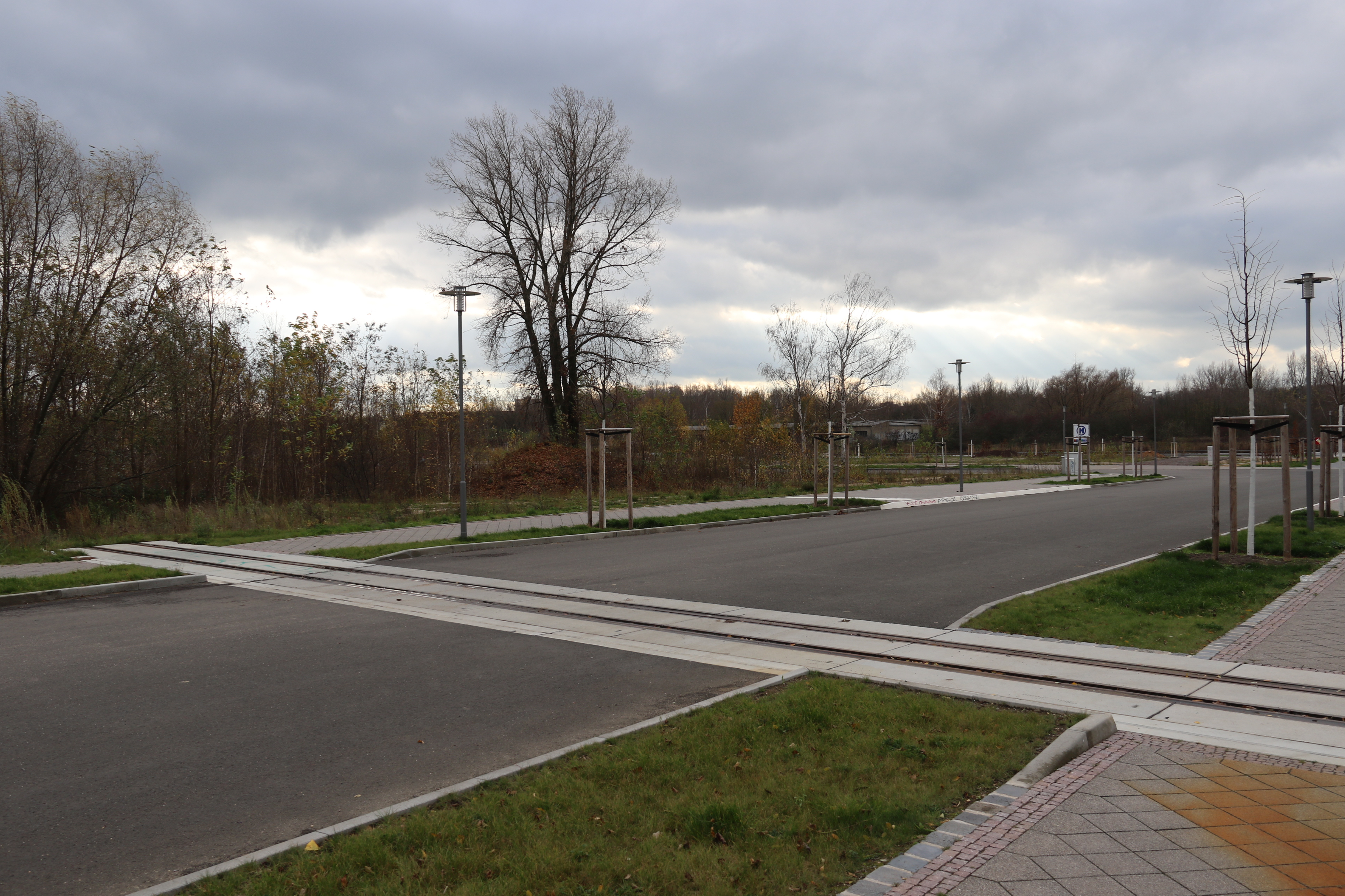 geplante Querung der Lindenauer Hafenbahn